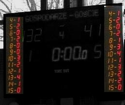 Tablica wyników z wyróżnionymi poszczególnymi faulami zawodników